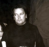 Washington Benavides, integrante del grupo de Tacuarembó